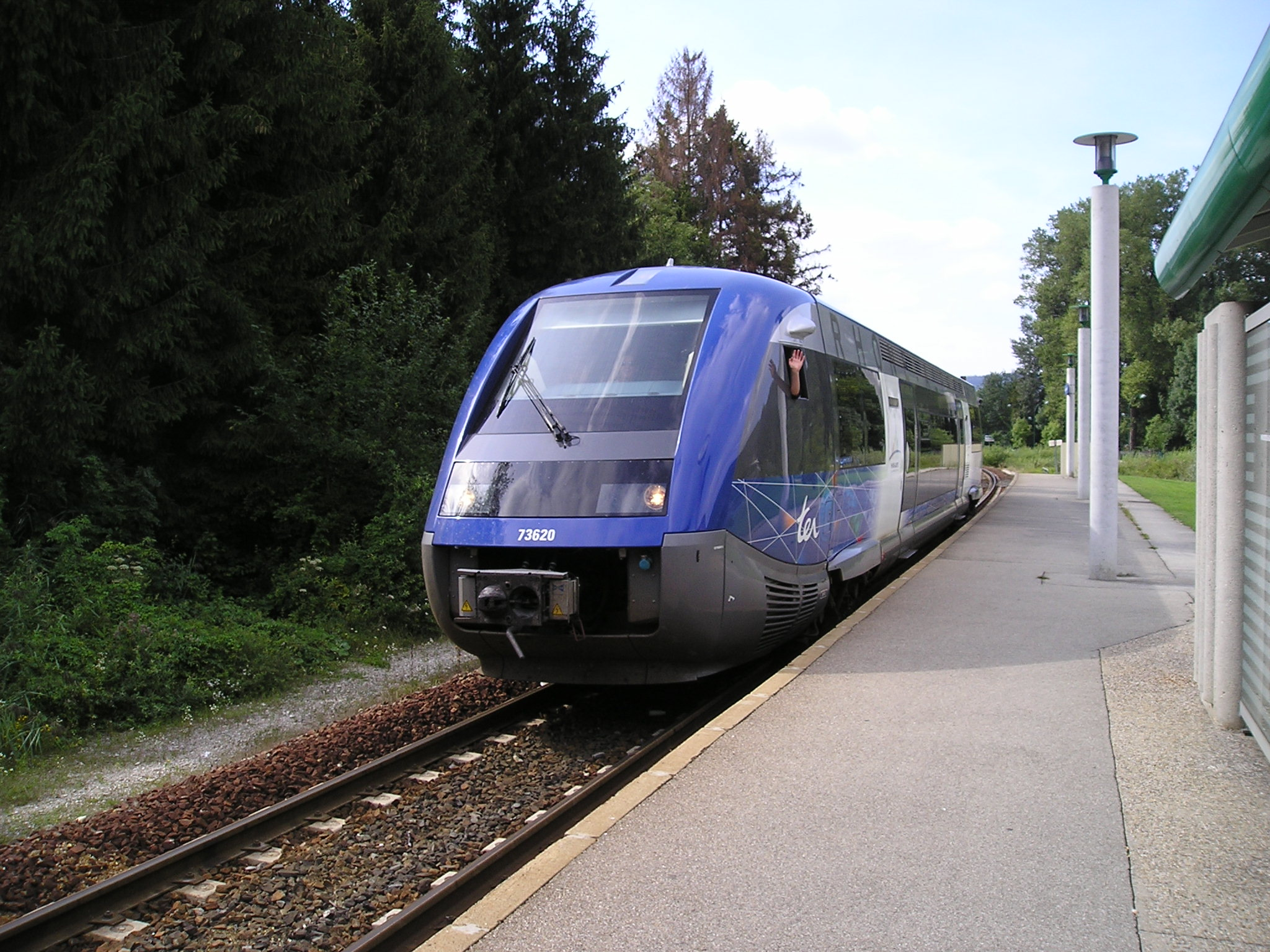 Un des derniers trains ayant circulé sur la ligne avant sa fermeture le 28 août 2005